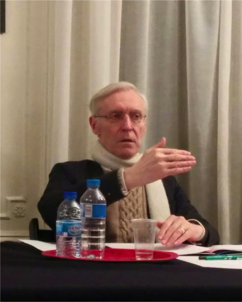 Henry de Lesquen donnant une conférence au Carrefour de l'horloge en janvier 2017.